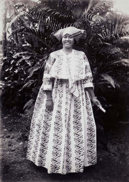 Foto. Creoolse vrouw in kotomisi